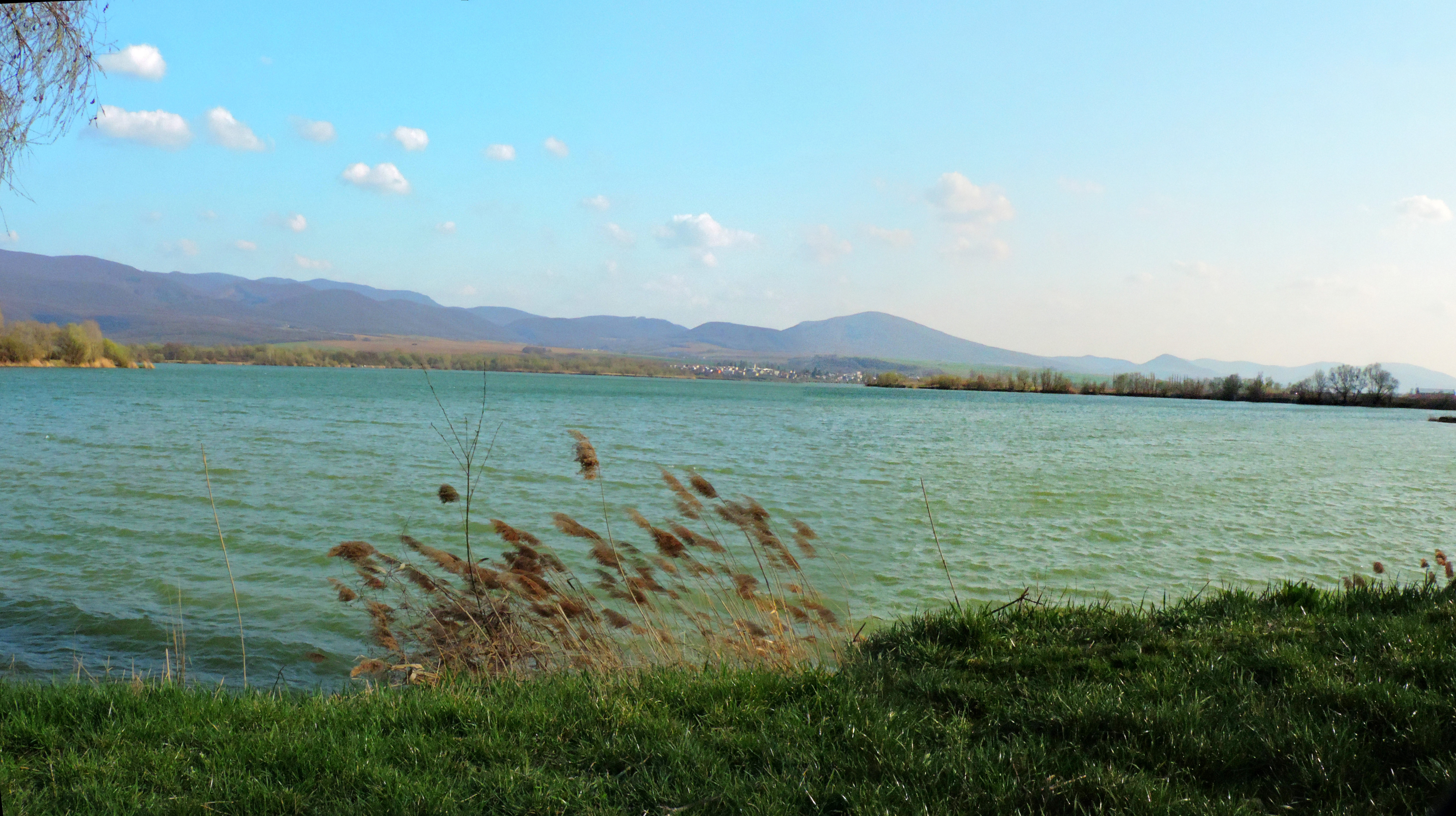 Čanianske jazero - panoráma